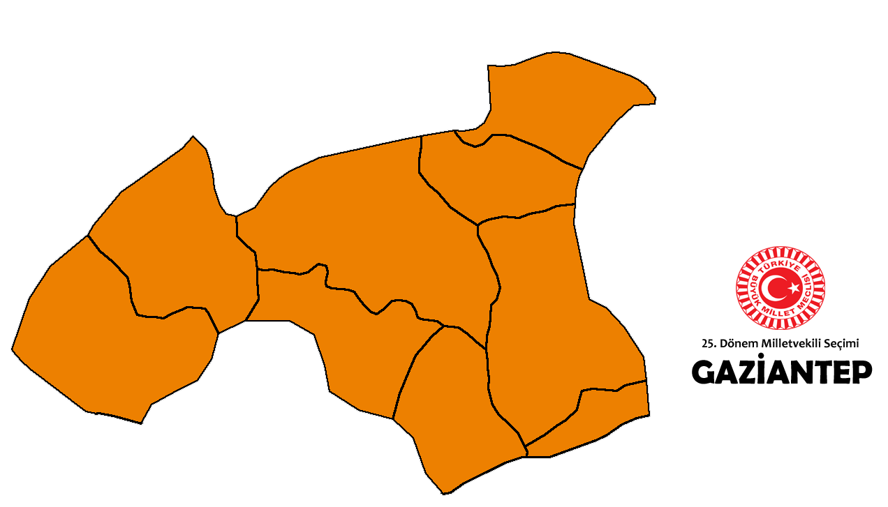 2015 genel seçim sonuçları